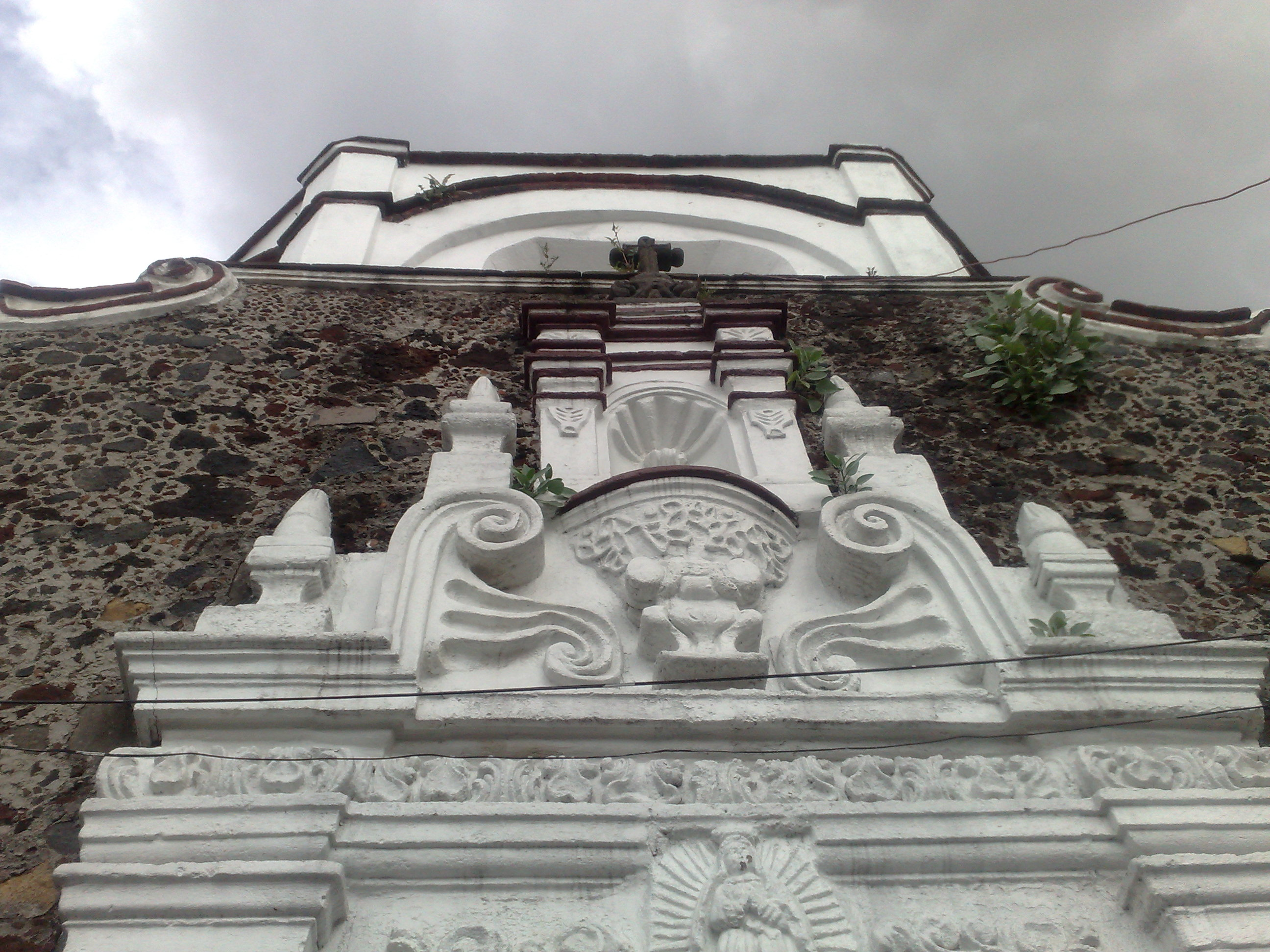 Ermita de la Asunción - Detalle del capitel